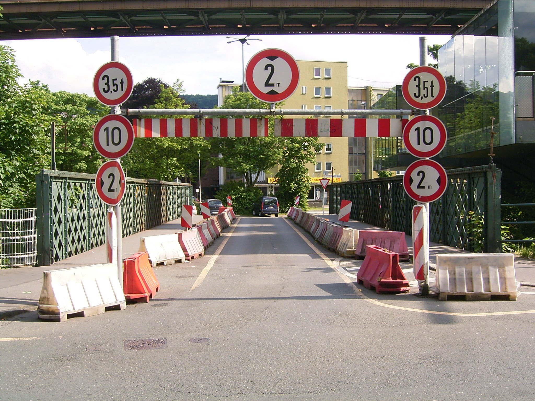 Adlerbrücke über die Wupper in Wuppertal